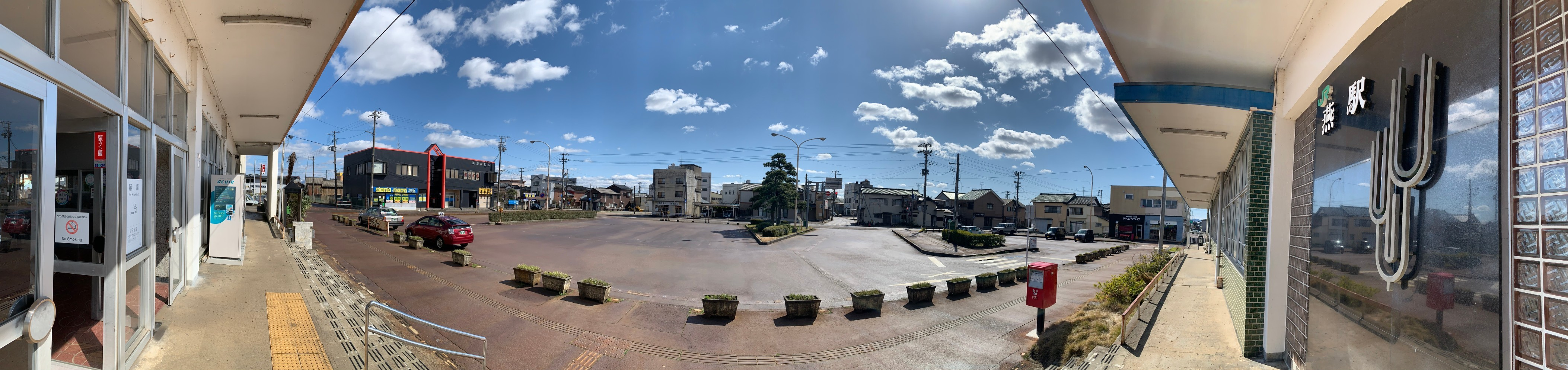 燕駅前風景（2020年3月）